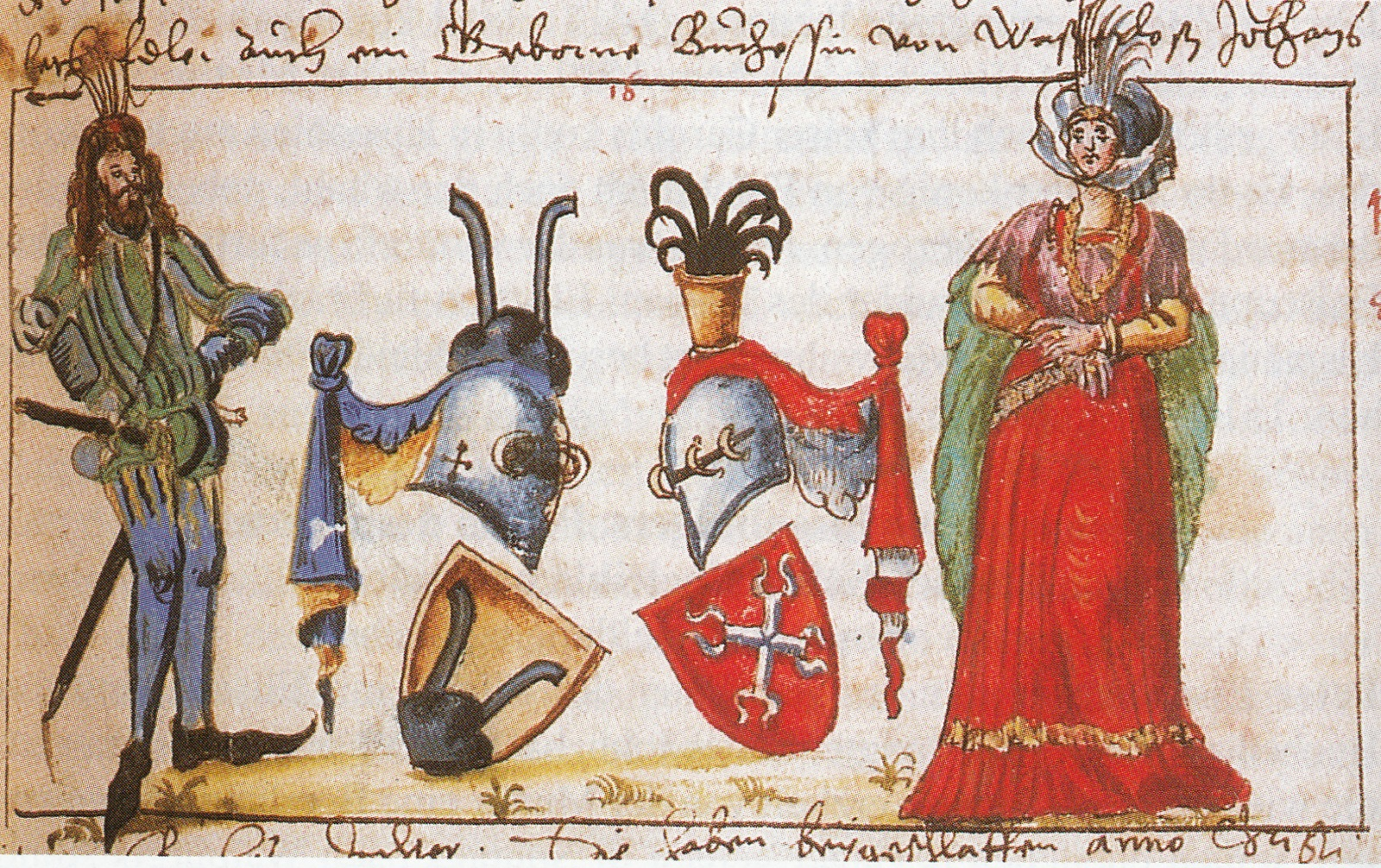 Peter Eisenberger tertius und Els von Buches zu Wasserloß